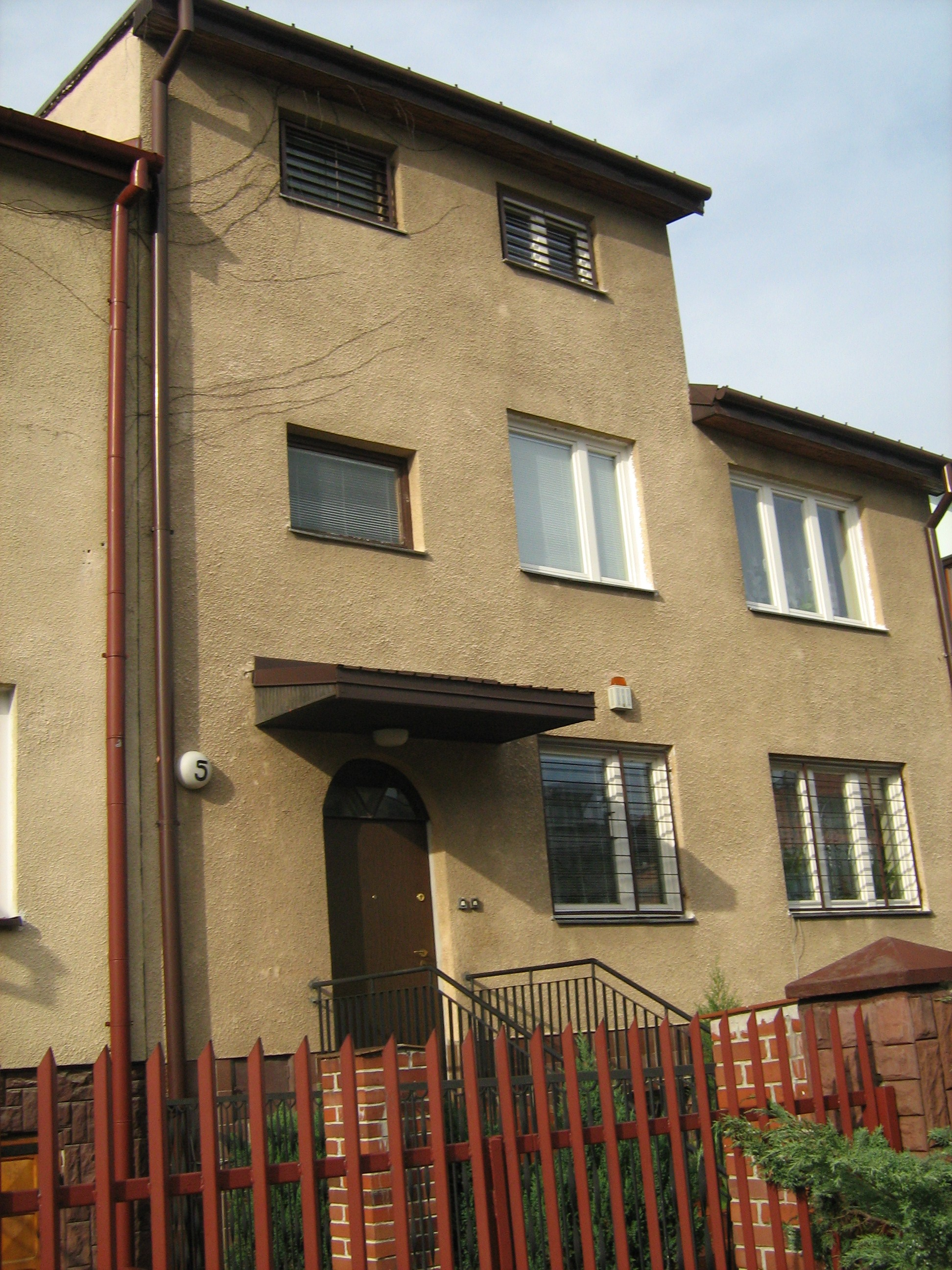 Catholic Mariavite Church in Warsaw (Poland) Kaplica Kościoła Katolickiego Mariawitów w Warszawie